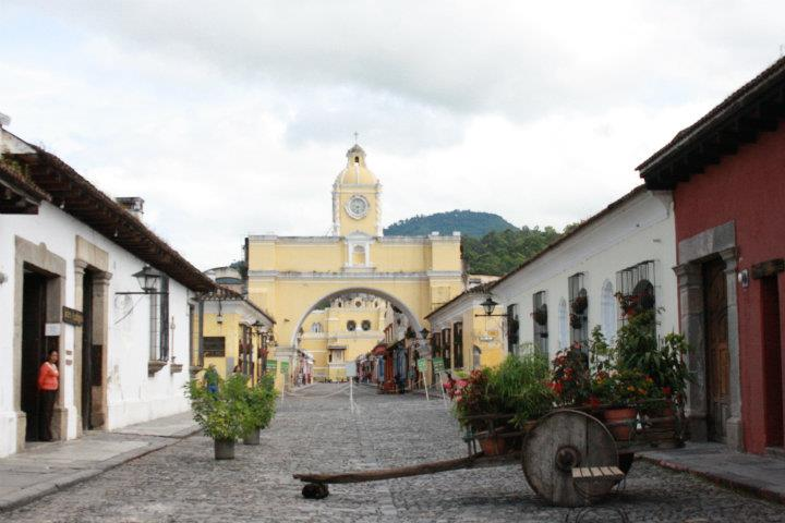 Antigua Guatemala. Únicamente para uso profesional, educativo o de presentación.